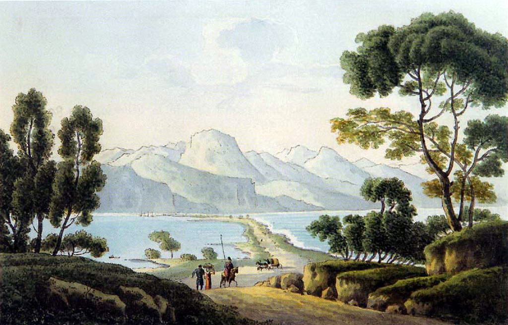 В 1805 Мартынов был приглашен в российское посольство в Китай, вместе с которым проделал путь до Урги (нынешнего Улан-Батора). Впечатления и наброски, сделанные в ходе этого путешествия, легли в основы созданных в последующие годы ряда живописных и графических работ. Эта картина датируется 1821 годом. Находится в Государственном музее А.С. Пушкина в Санкт-Петербурге